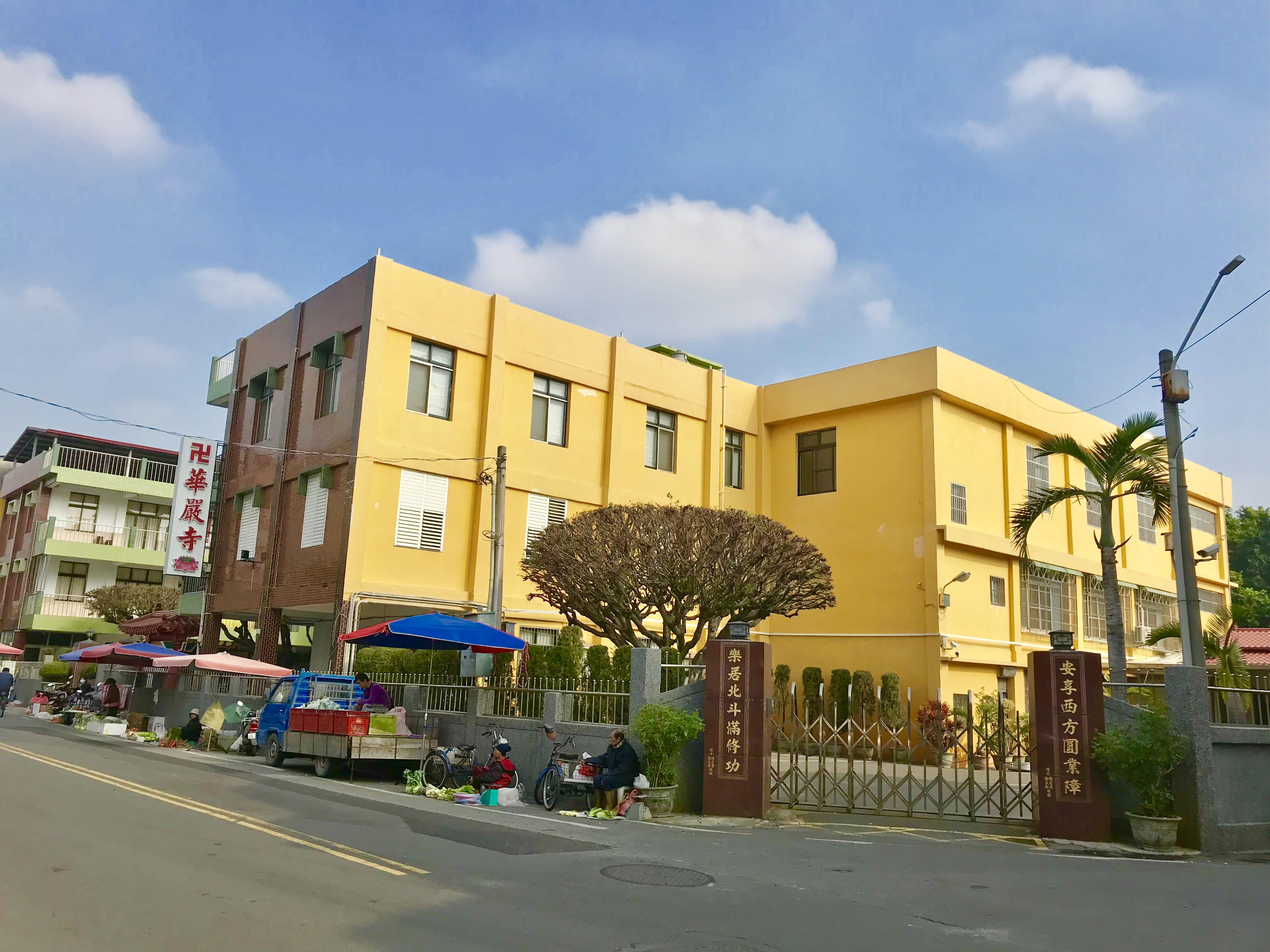 北斗華嚴寺一角